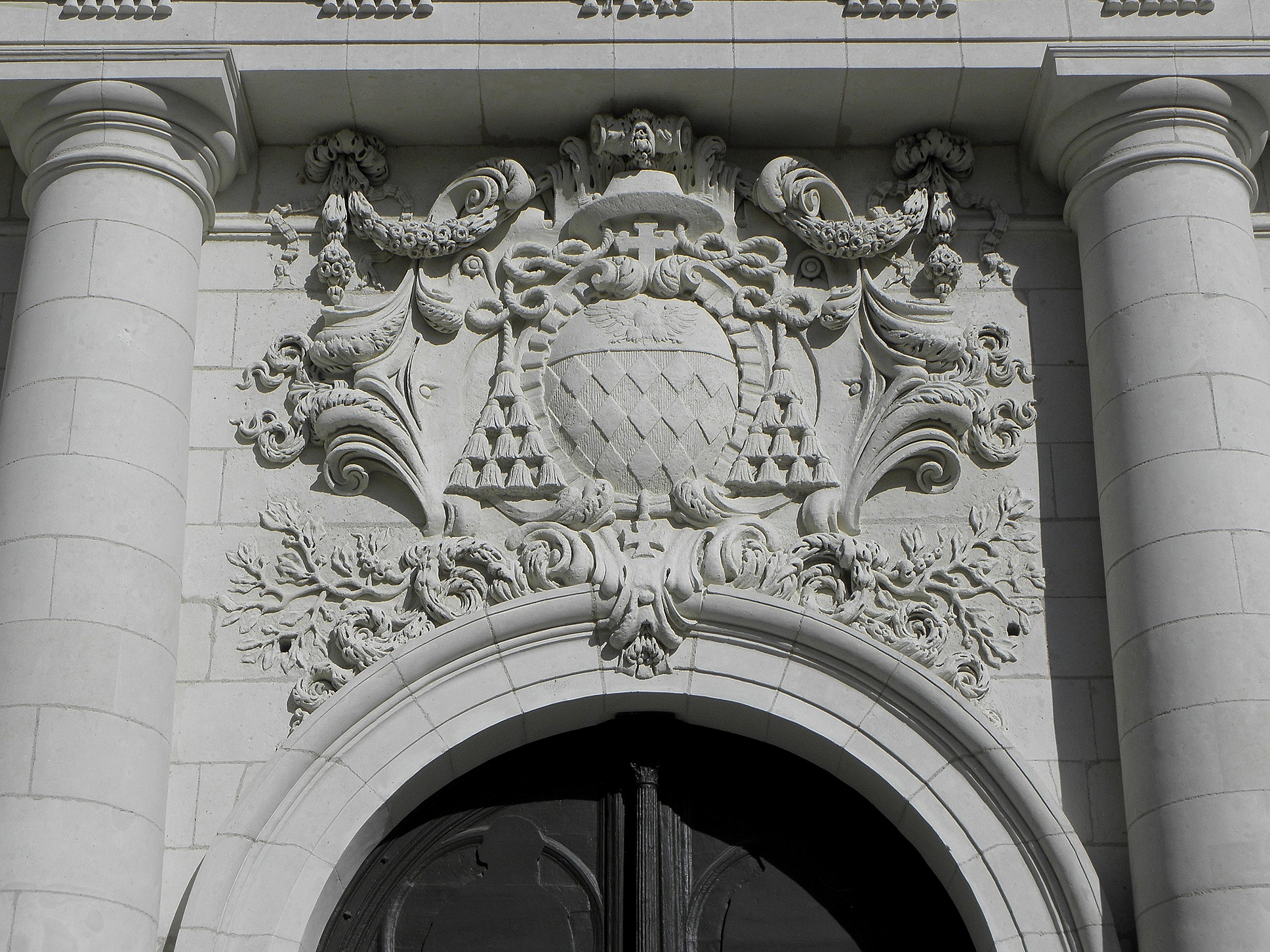 Extérieur de l'église Saint-Pierre-du-Marais de Saumur (49). Façade occidentale. Détail : armes du cardinal Jérôme Grimaldi-Cavalleroni, abbé commendataire de Saint-Florent, qui subventionna la réfection de la façade